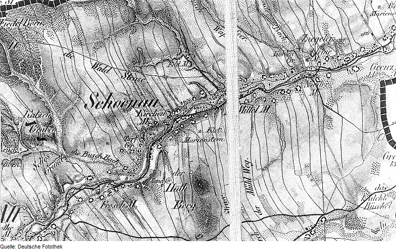 Original image description from the Deutsche Fotothek Schönau-Berzdorf auf dem Eigen-Schönau. Oberreit, Sect. Zittau, 1844/46